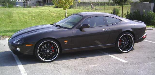 2006 Jaguar XKR coupe